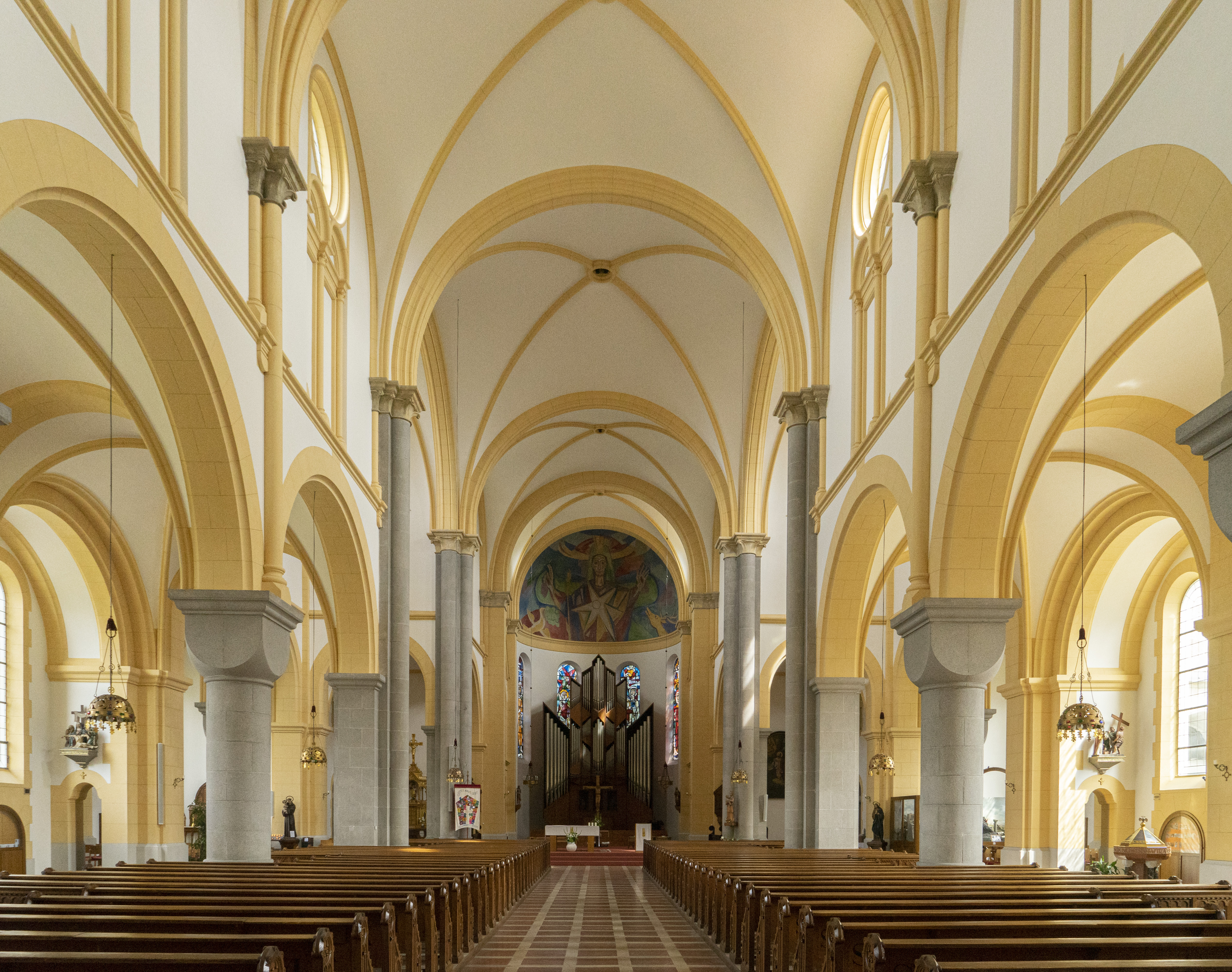 Herz Jesu Kirche, Wels, Innenraum